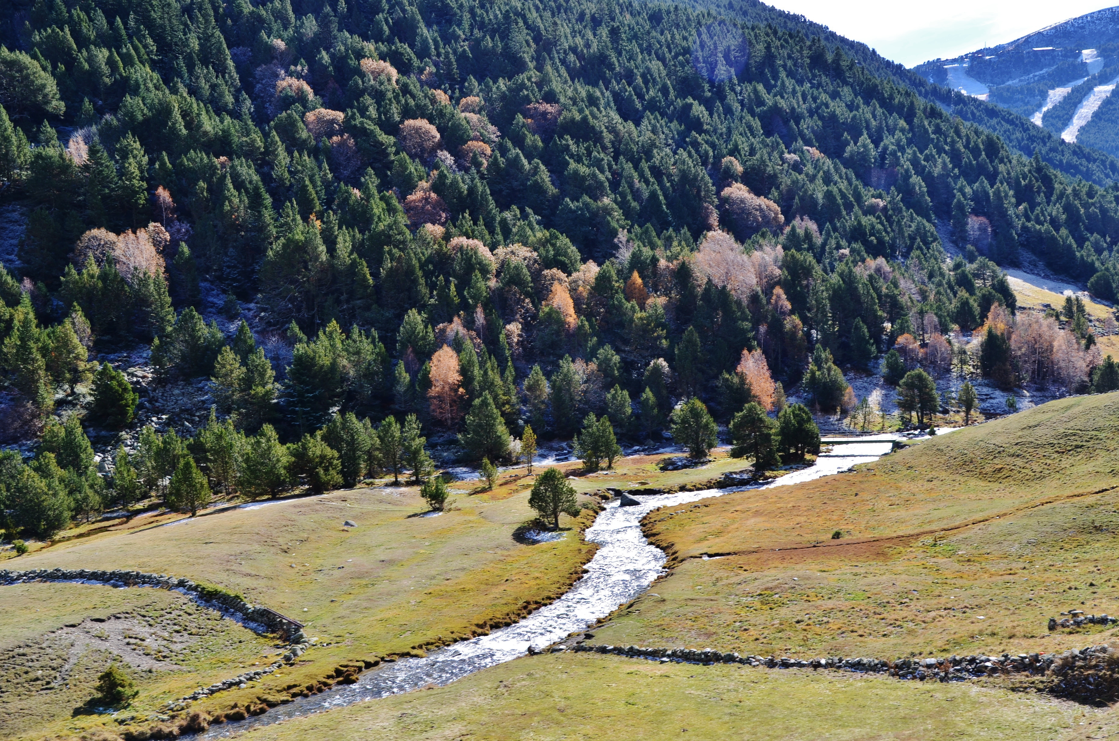 Riu d'Incles This is a a photo of a river in Andorra with id: IEA-R-32